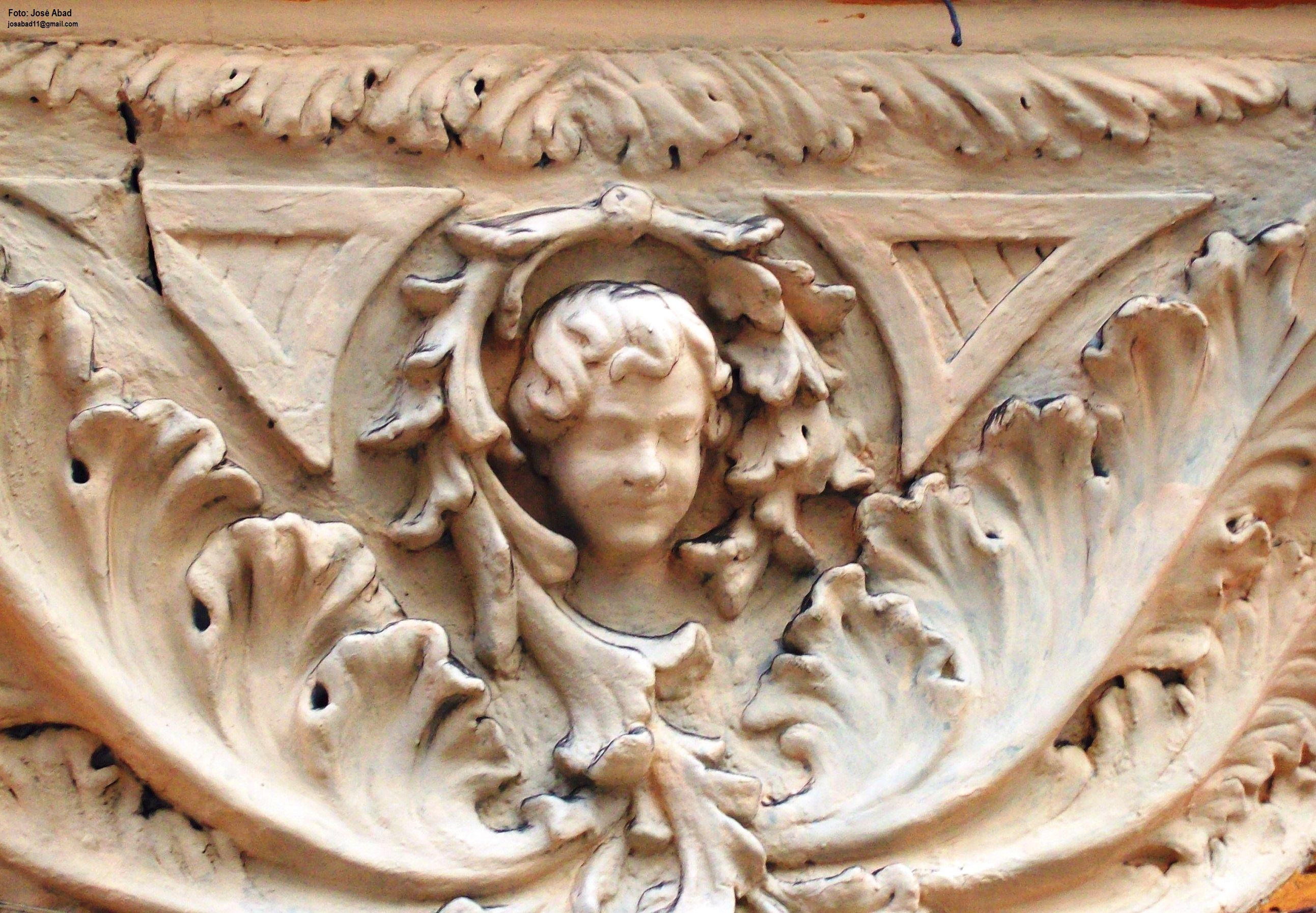 Detalle de uno de los balcones de la Plaza Bolognesi que data de comienzos del siglo XX. Distrito de Breña.